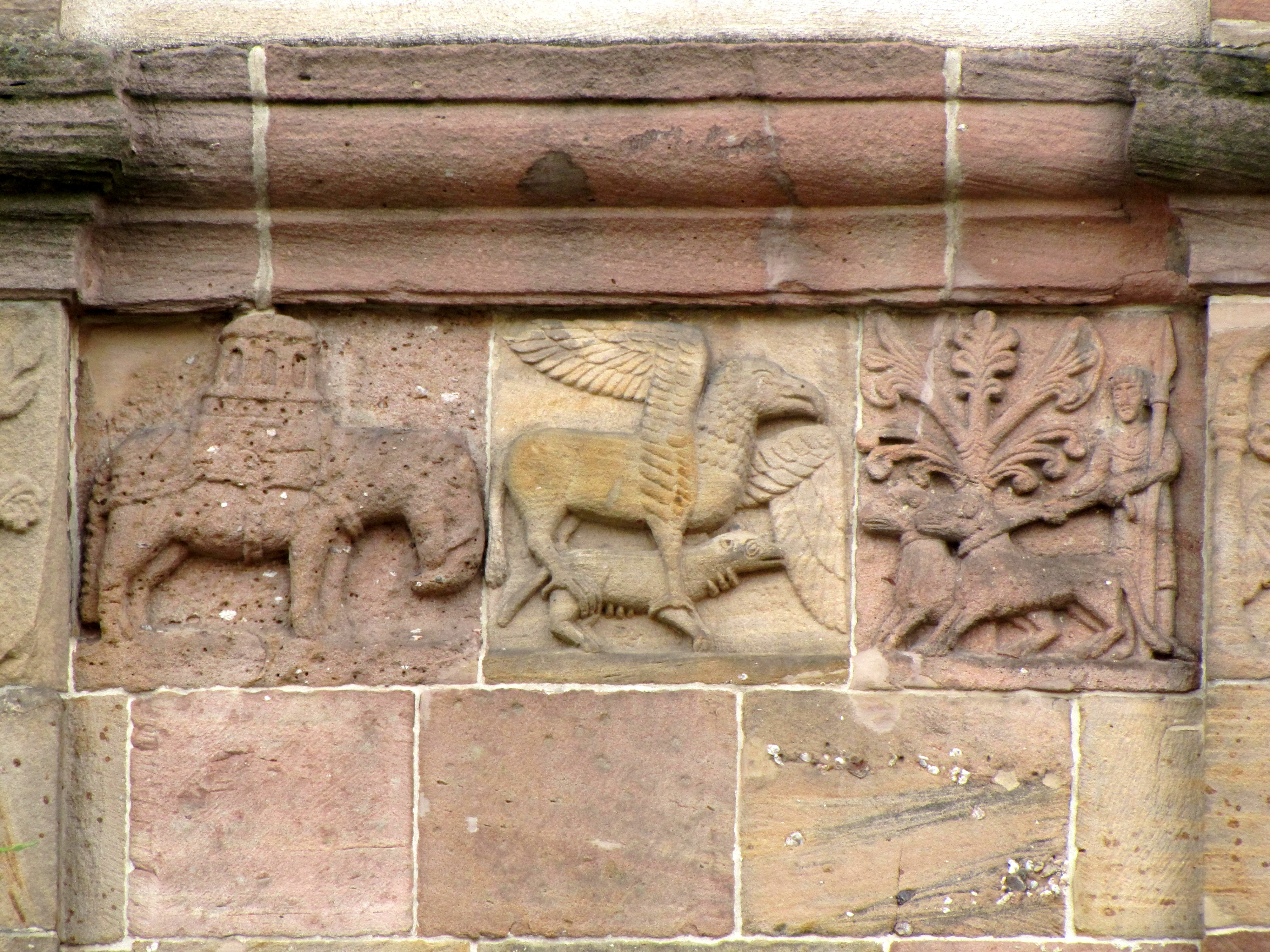 Alsace, Bas-Rhin, Église Saints-Pierre-et-Paul dite Sainte-Richarde (PA00084587, IA00115010). Bas-relief roman sur la frise extérieure (XIIe): scène de chasse avec éléphant et aigle.